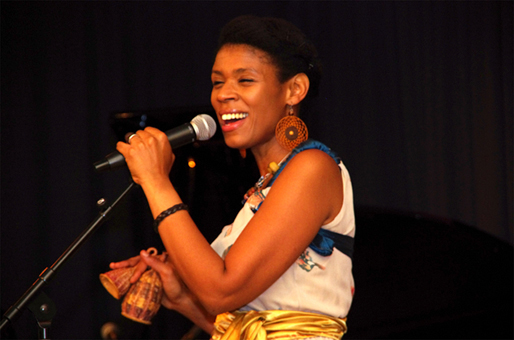 Jazzsängerin Carmen Souza, Konzert Einbeck 2014